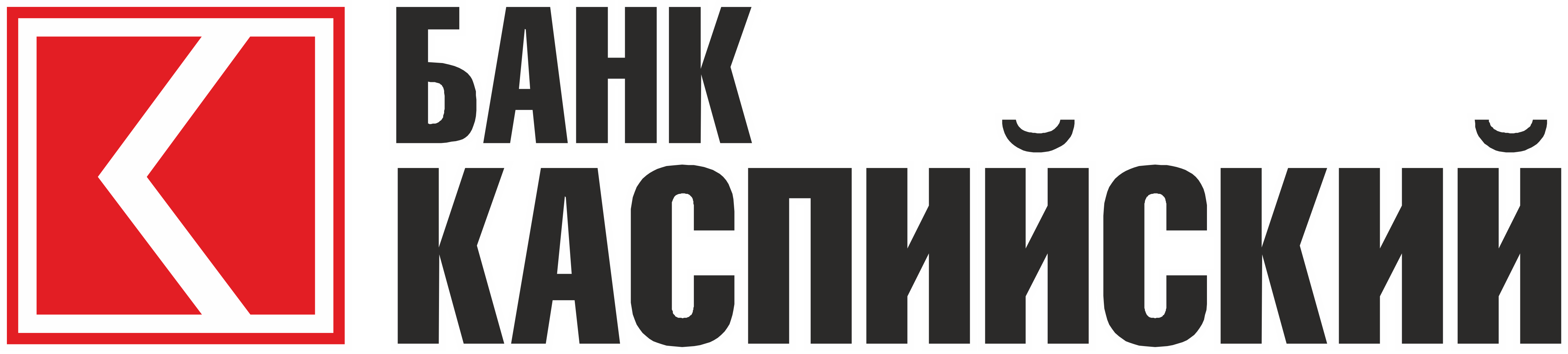 Логотип Банк Каспийский с 1997 по 2008 год